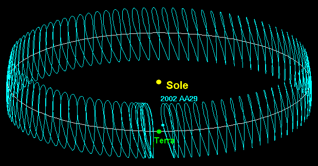 Orbita dell'asteroide 2002 AA29 rispetto alla Terra in un arco di tempo di 95 anni. Etichette in italiano.